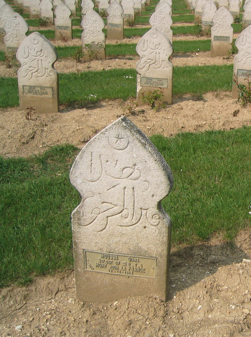 Tombe de Moussa Diara, 87e bataillon de Tirailleurs sénégalais, mort pour la France en octobre 1918 (carré musulman au cimetière du Fort de Douamont (Meuse, France)